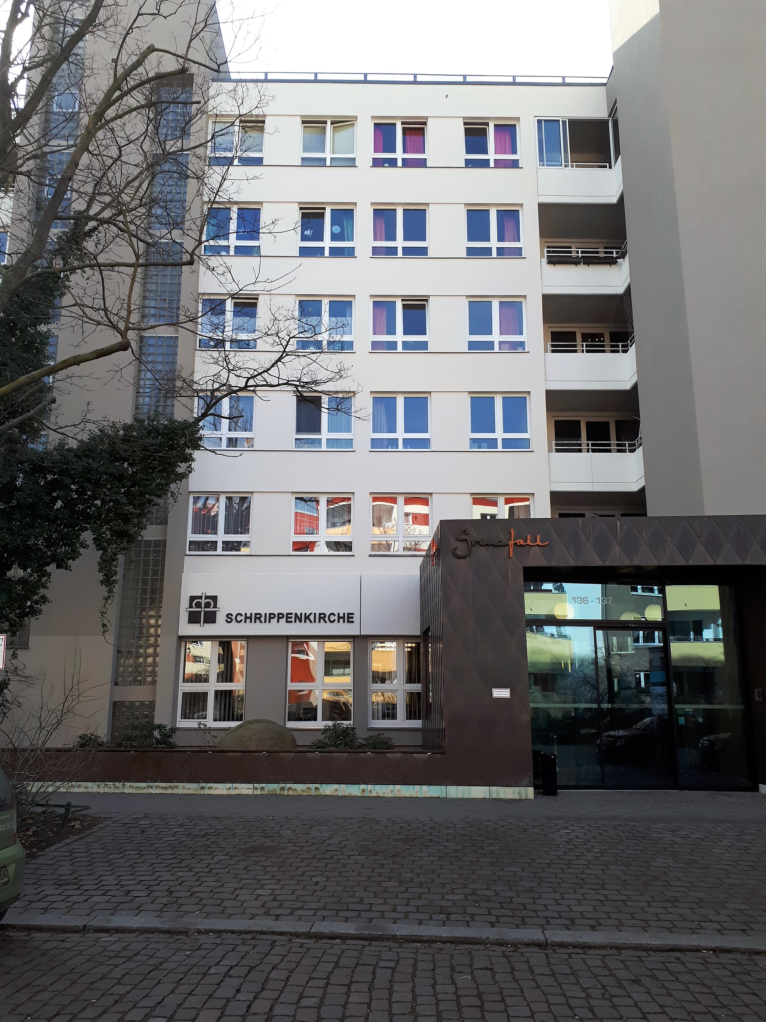 Gesundbrunnen Ackerstraße Schrippenkirche